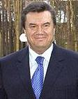 Viktor Yanukovych visits Russia